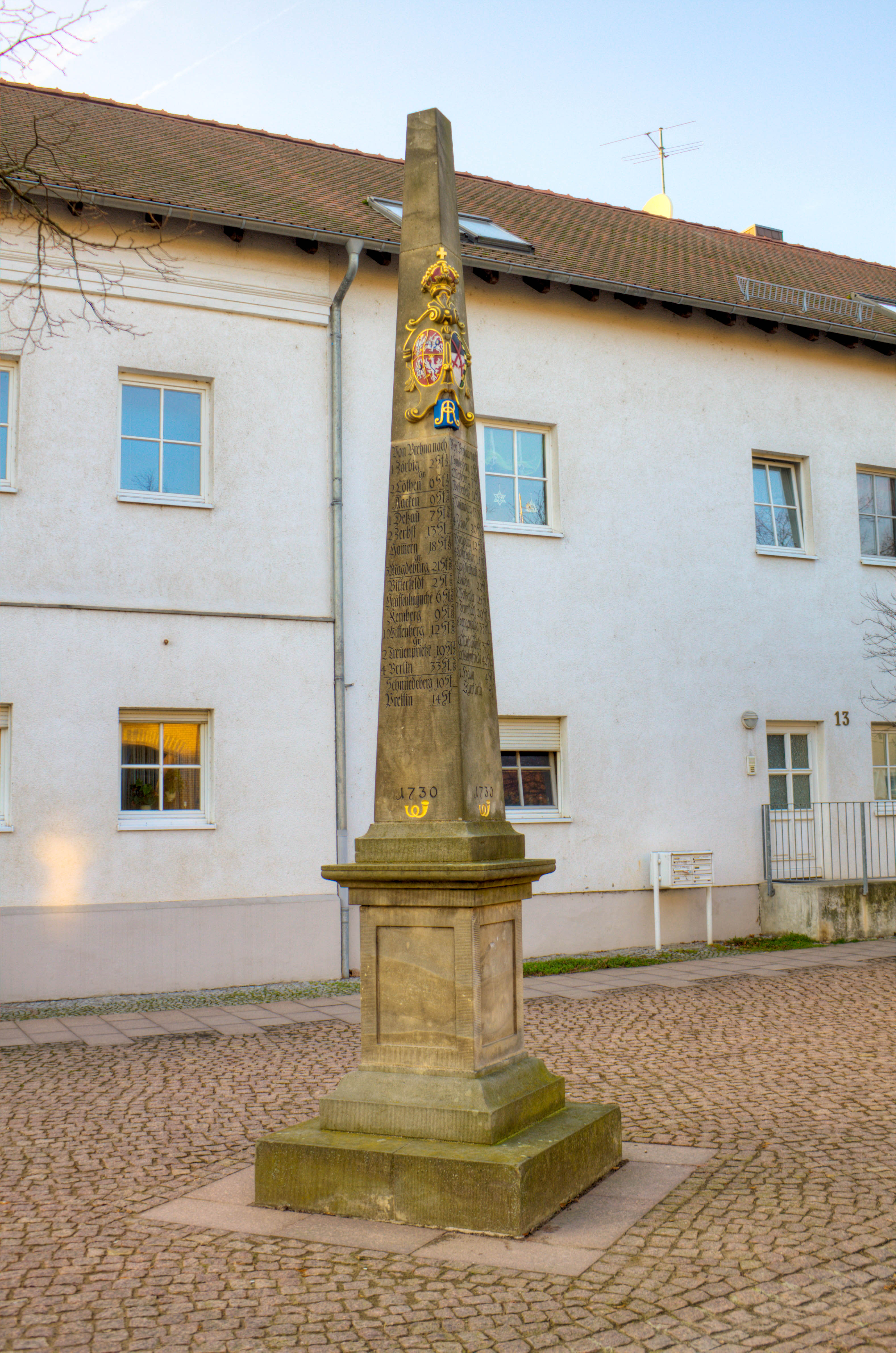 Kursächsische Postmeilensäule-Distanzsäule in Brehna